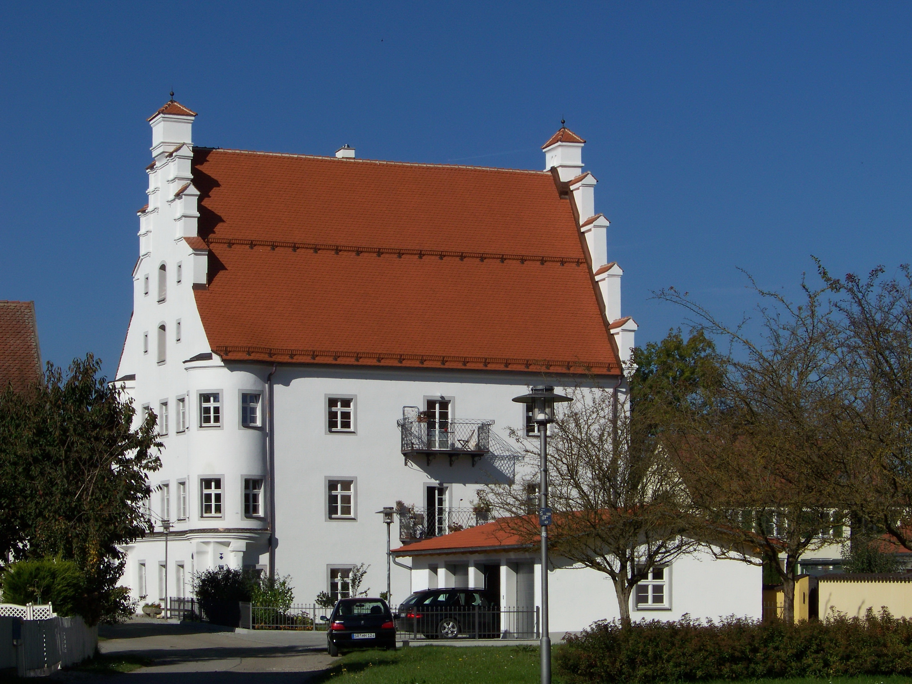 Geiselhöring, Sallach 53a. Schloss. Stattlicher, das Ortsbild beherrschender Bau mit Staffelgiebeln und zwei halbrunden Eckerkern, 1595.